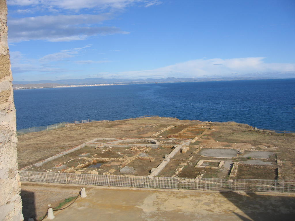 Area archeologica di Capo Colonna